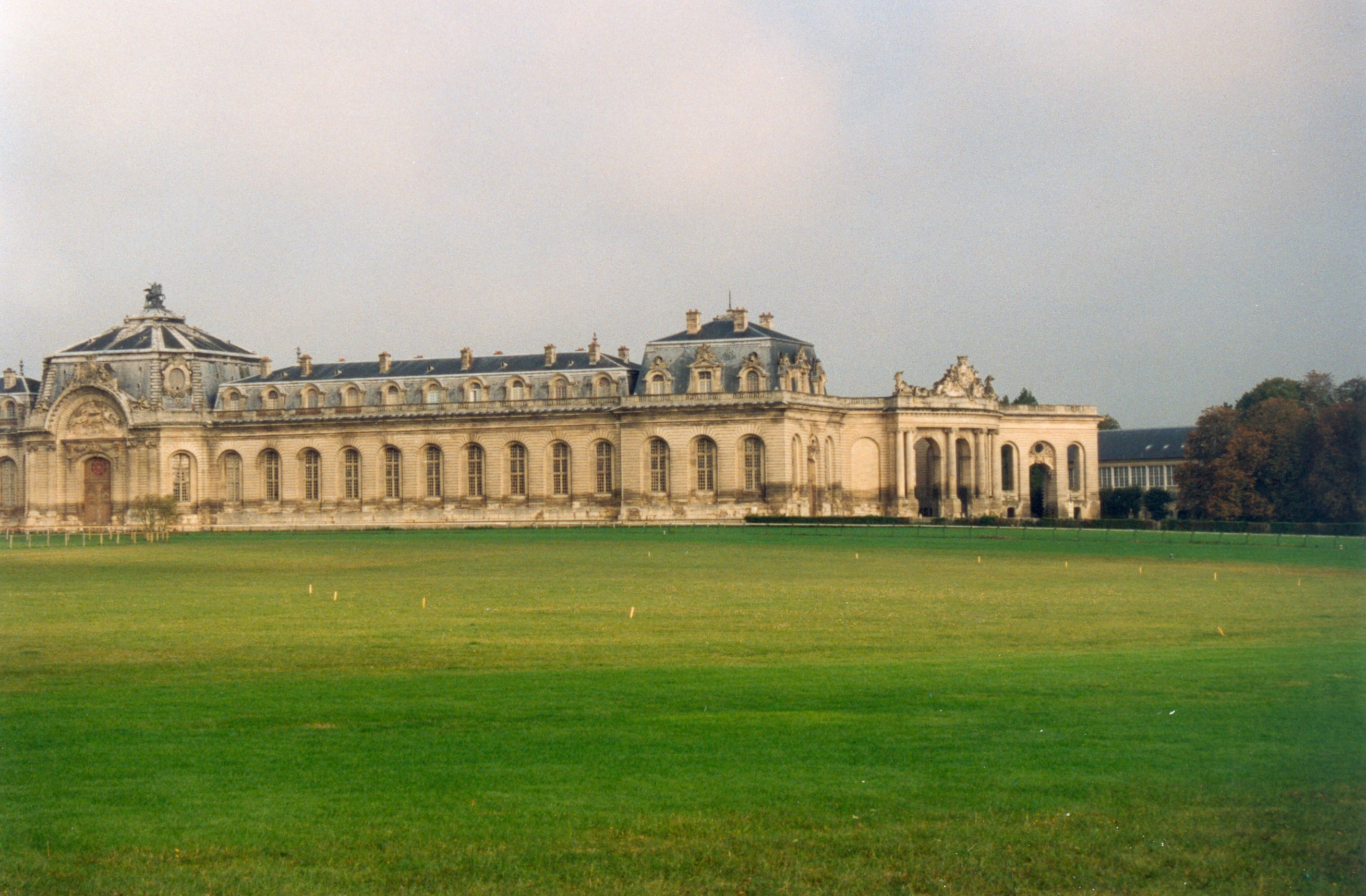 Grandes écuries de Chantilly, Oise, France